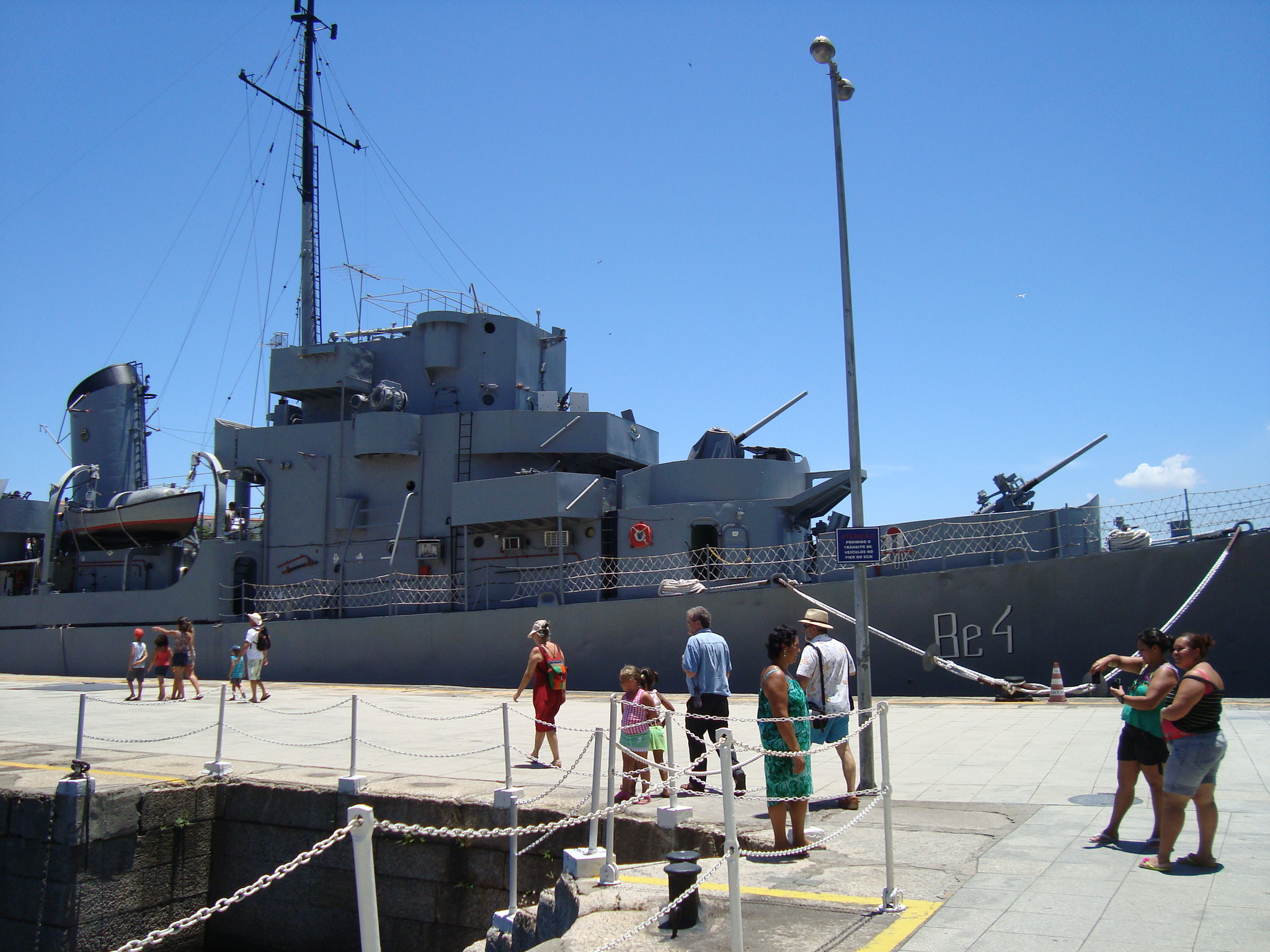 Contratorpedeiro Baurú (Be-4) no Espaço Cultural da Marinha na cidade do Rio de Janeiro, Brasil